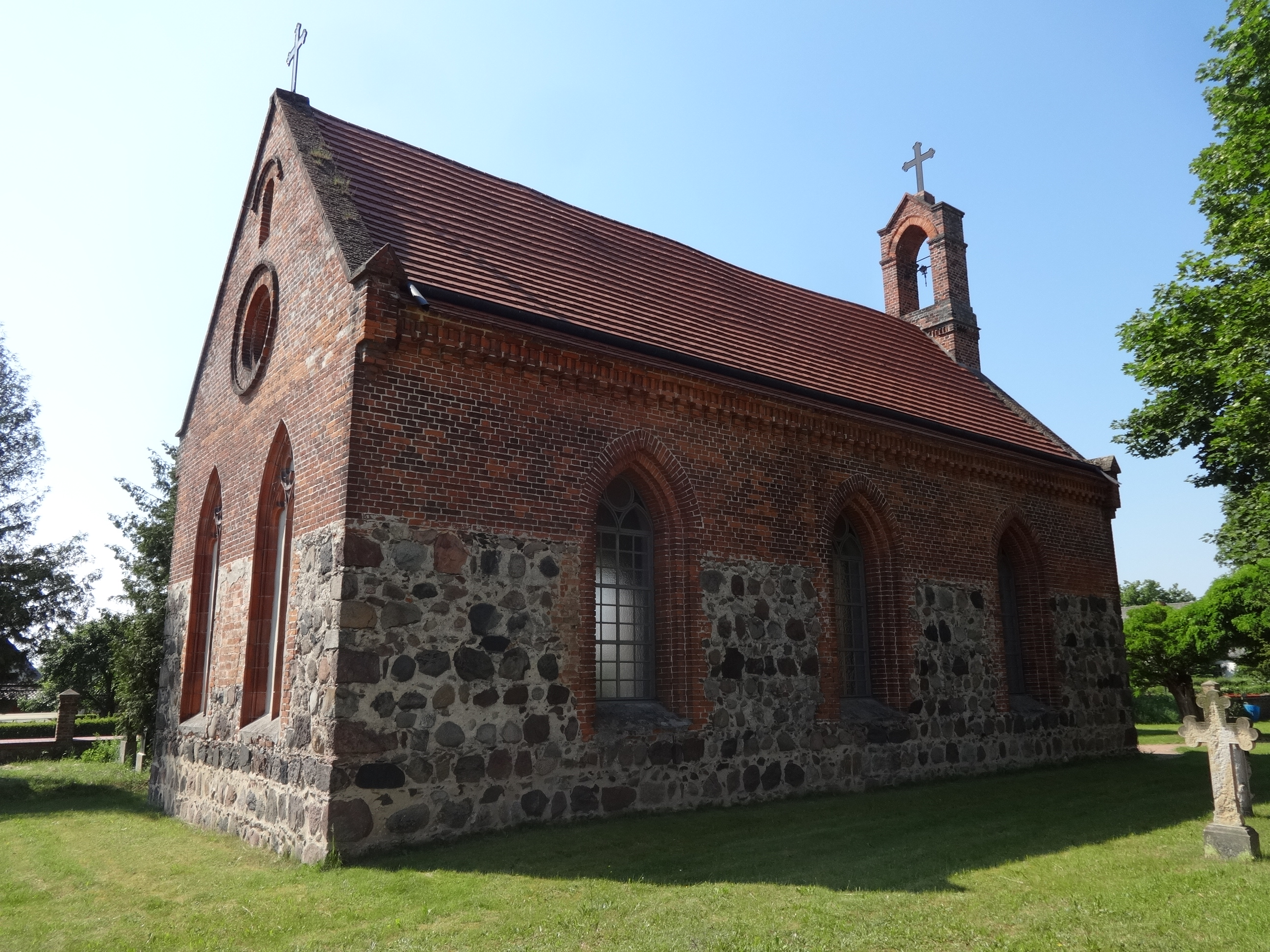 Die Dorfkirche in Rotberg entstand im 14. Jahrhundert als Feldsteinkirche und wurde um 1860 neugotisch umgebaut. Im Innern befindet sich eine hölzerne Kanzel aus der Zeit um 1700.